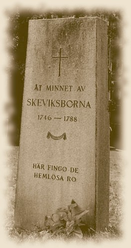 Skevikarnas gemensamma gravsten/minnessten på Johannes kyrkogård i Stockholm